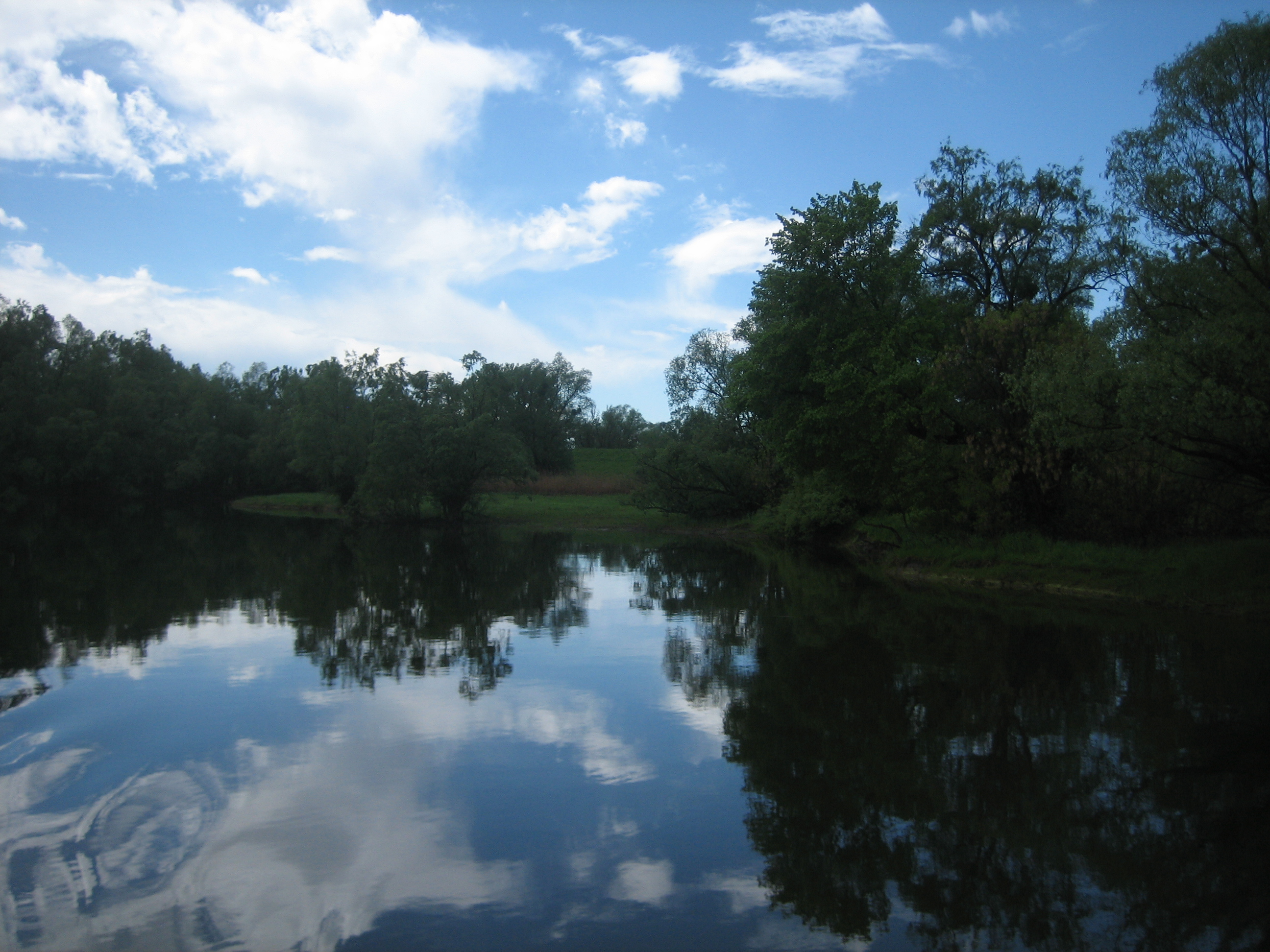 Kopački rit, a nature park in Baranja, eastern Croatia / Park prirode Kopački rit u Baranji.